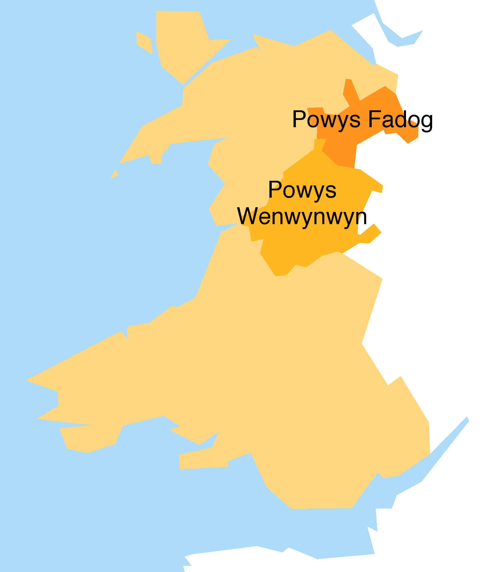 Croquis de localisation du Powys en 1190 sur une carte de l'actuel pays de Galles. Pour le tracé des côtes et de la frontière Galles-Angleterre, je me suis inspiré (en simplifiant beaucoup) d'une carte de 1904. Pour placer le Powys, je me suis fié (toujours en simplifiant) à la carte Powys3 1190.JPG de JamesFrankcom.